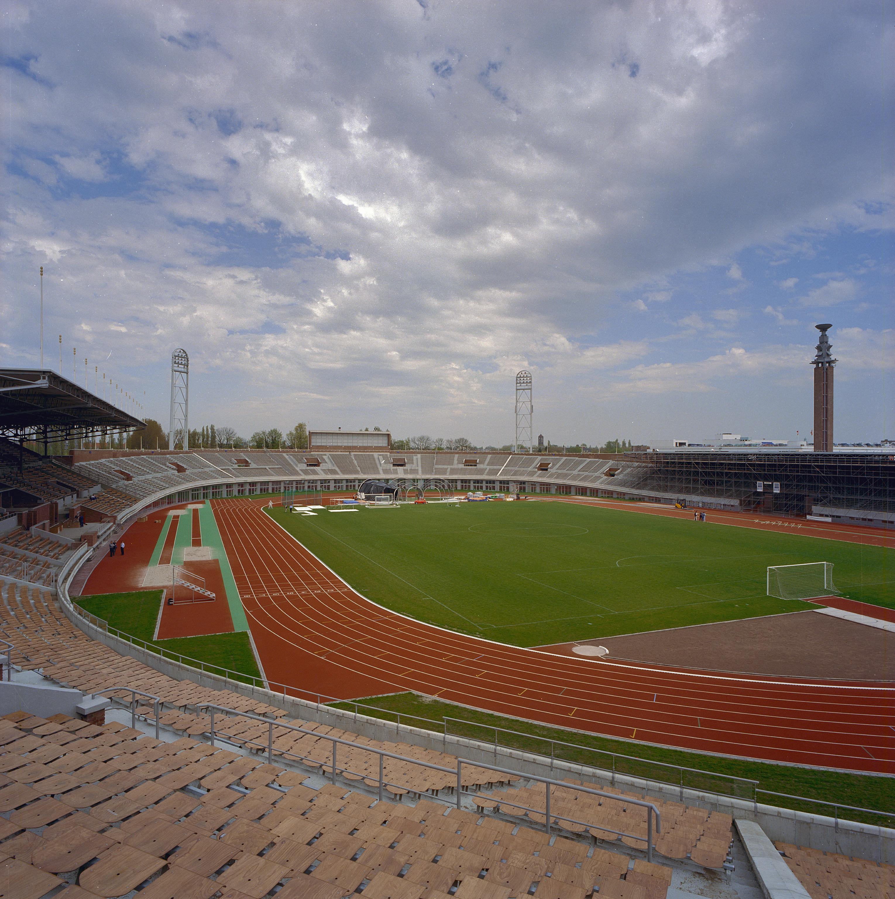 Olympisch Stadion: Interieur, overzicht, na de restauratie